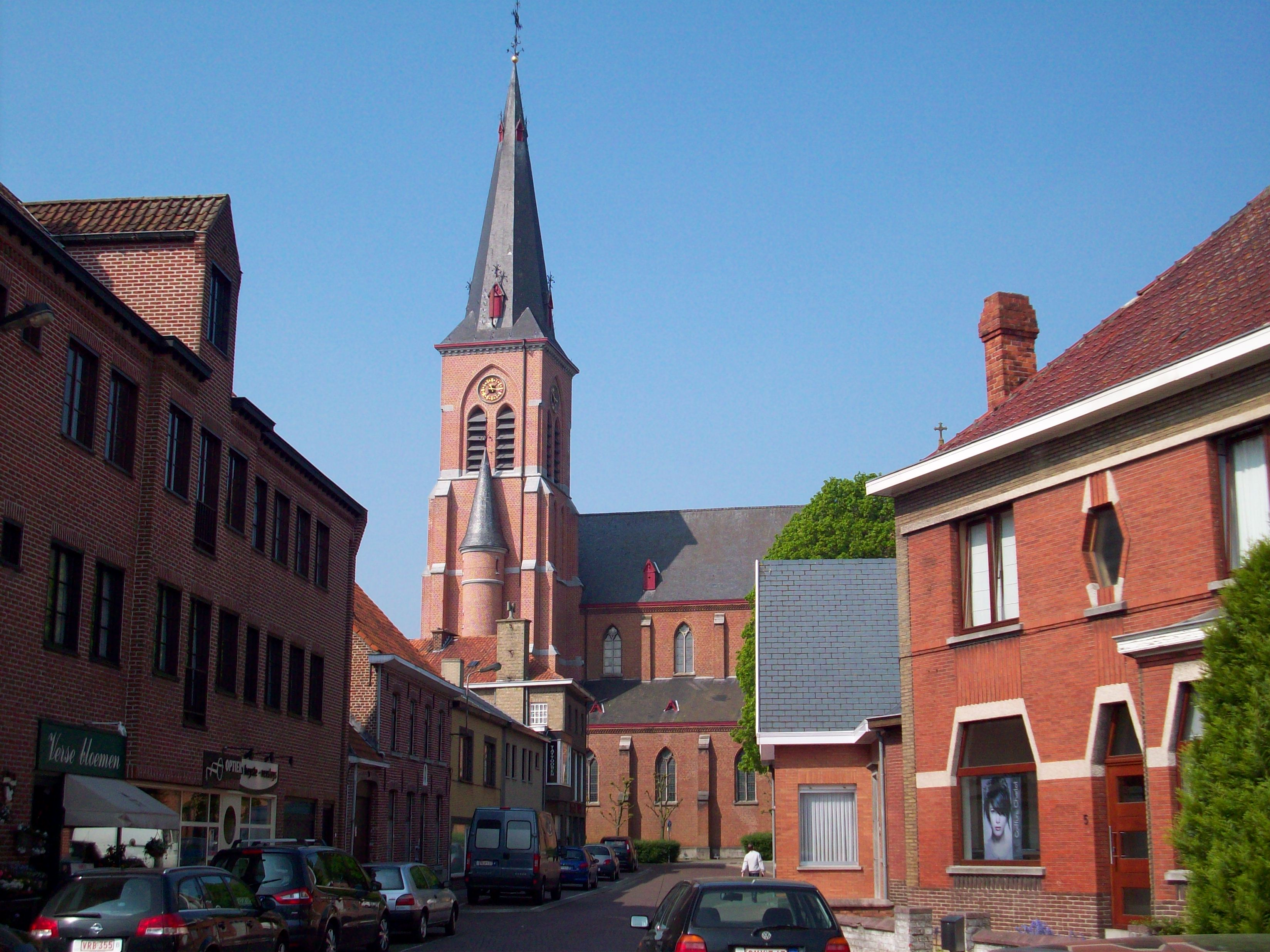 Kerk Knesselare